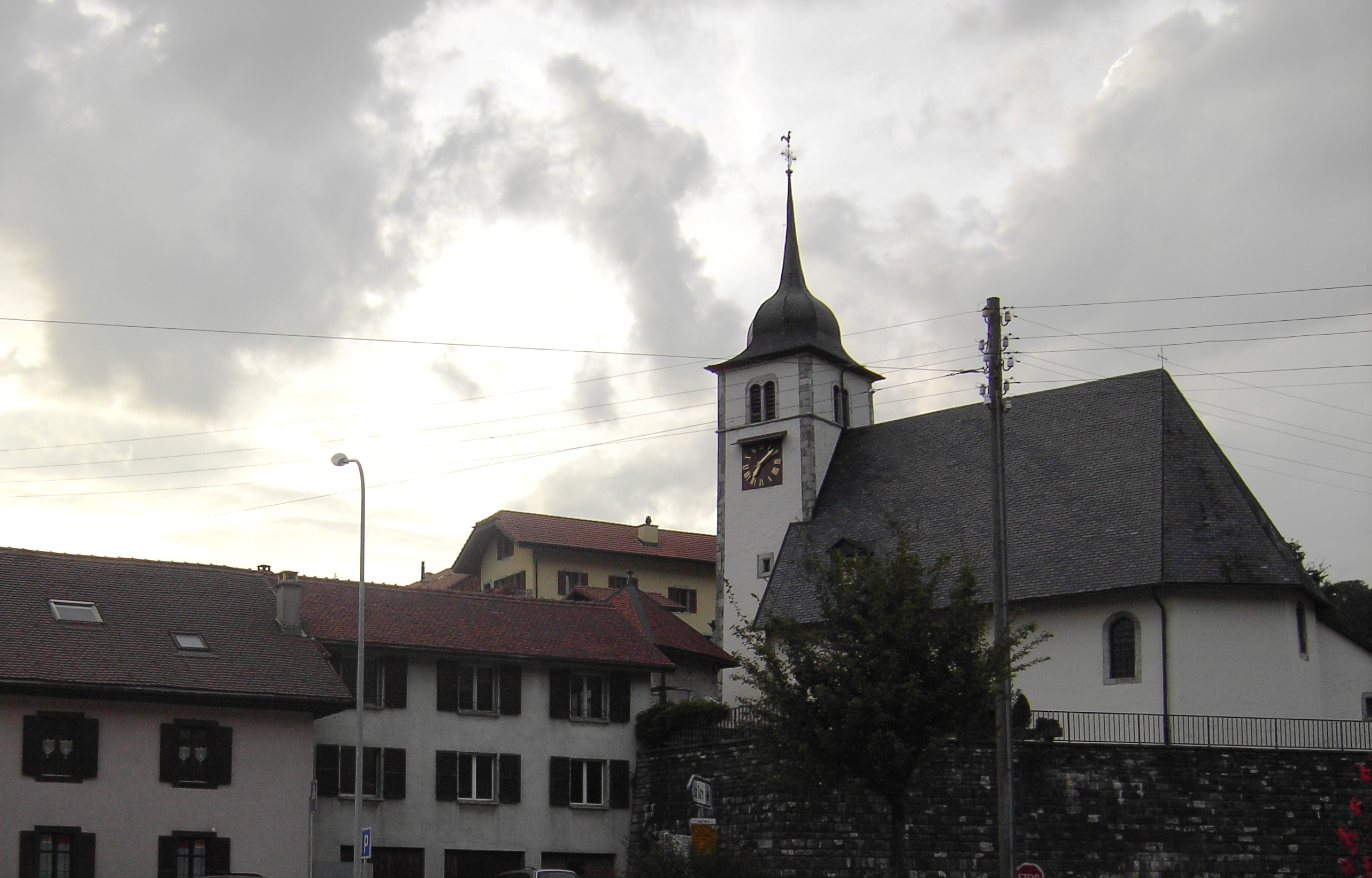 L'eglise d'Enney, Bas-Intyamon FR, Suisse